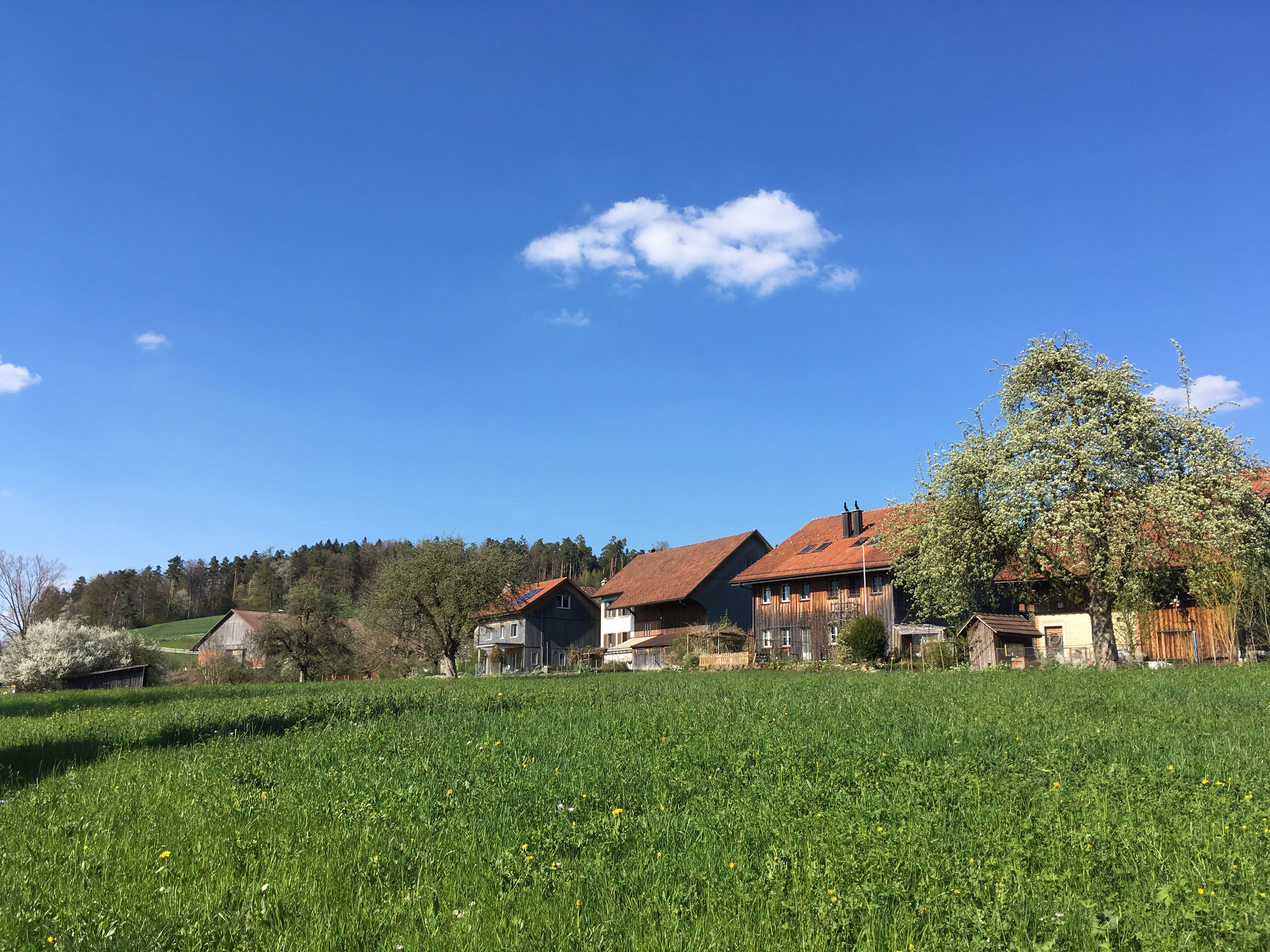 Blick auf Eidberg bei Winterthur von Südwesten